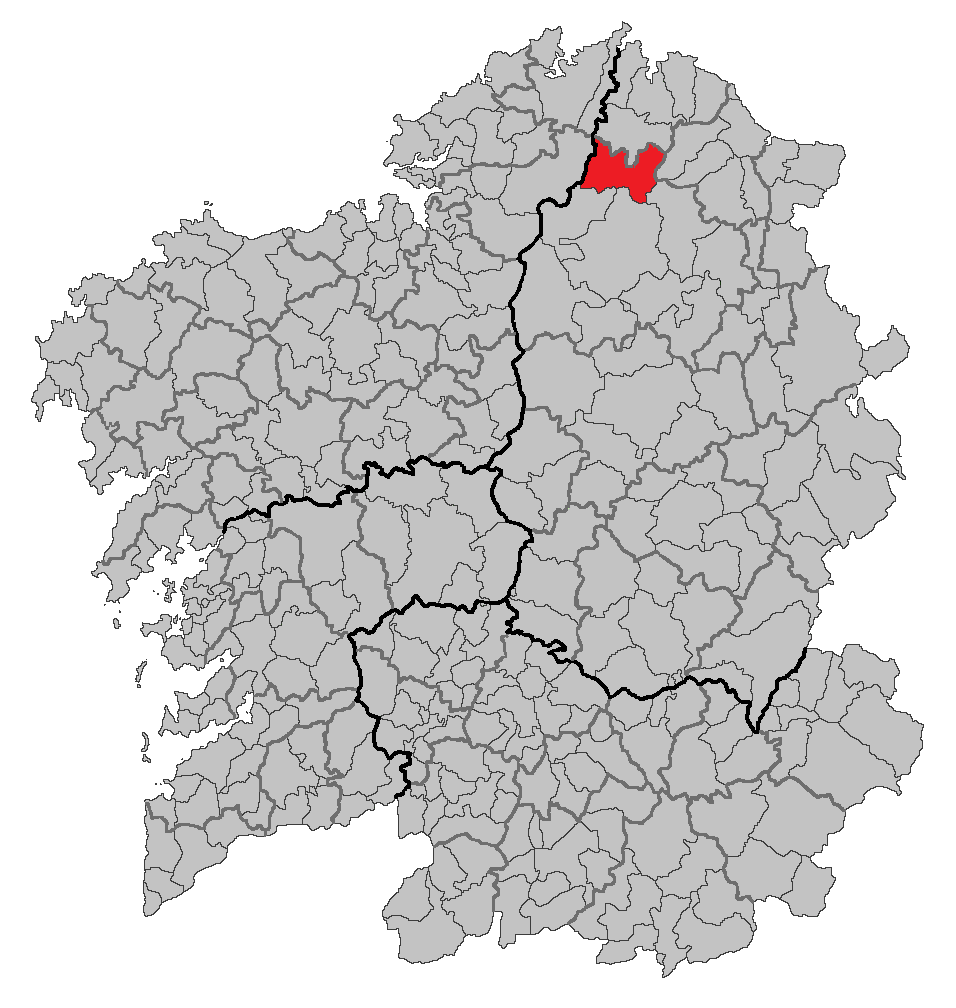 Mapa coa localización do concello de Muras.